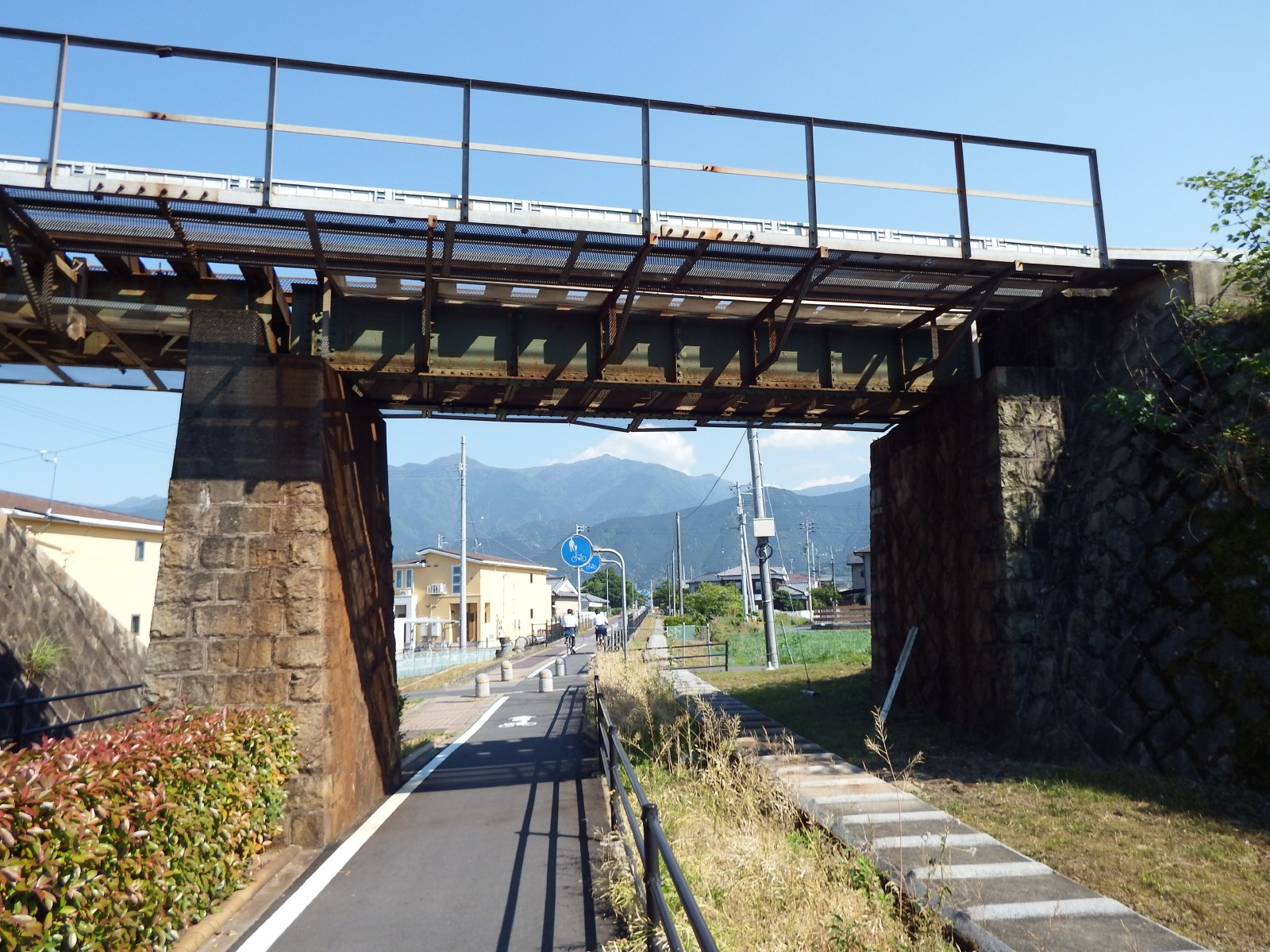 住友鉱山下部鉄道跡